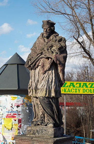 Johannes-Nepomuk-Statue in Rückers (Szczytna), ehemalige Grafschaft Glatz, Niederschlesien, Polen.